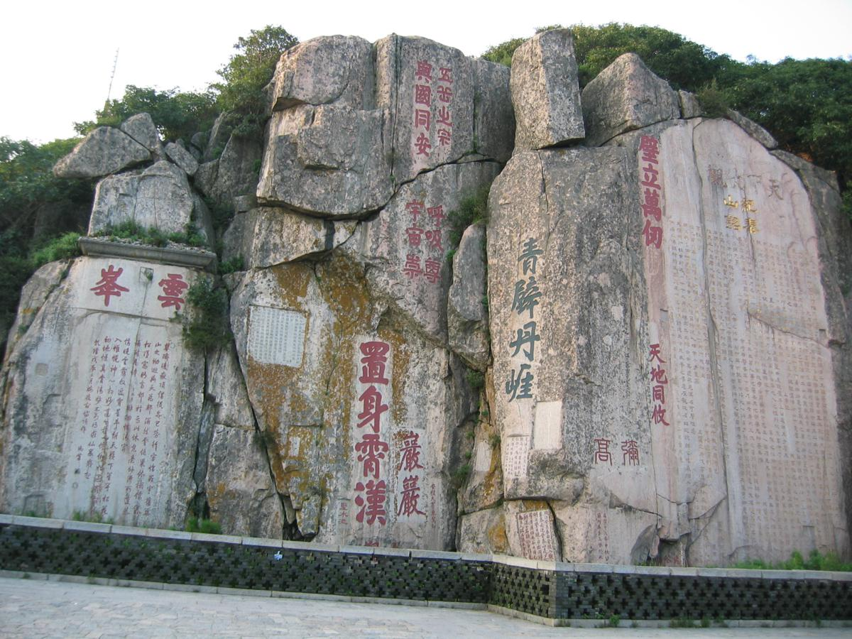 Надписи на горе Тайшань